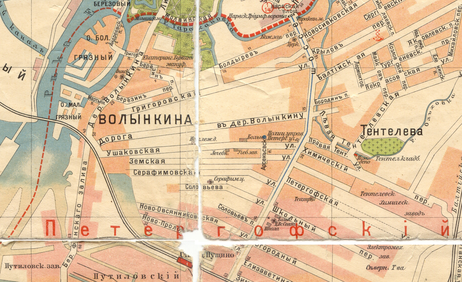 Район деревни Волынкина в Санкт-Петербурге, 1913 год